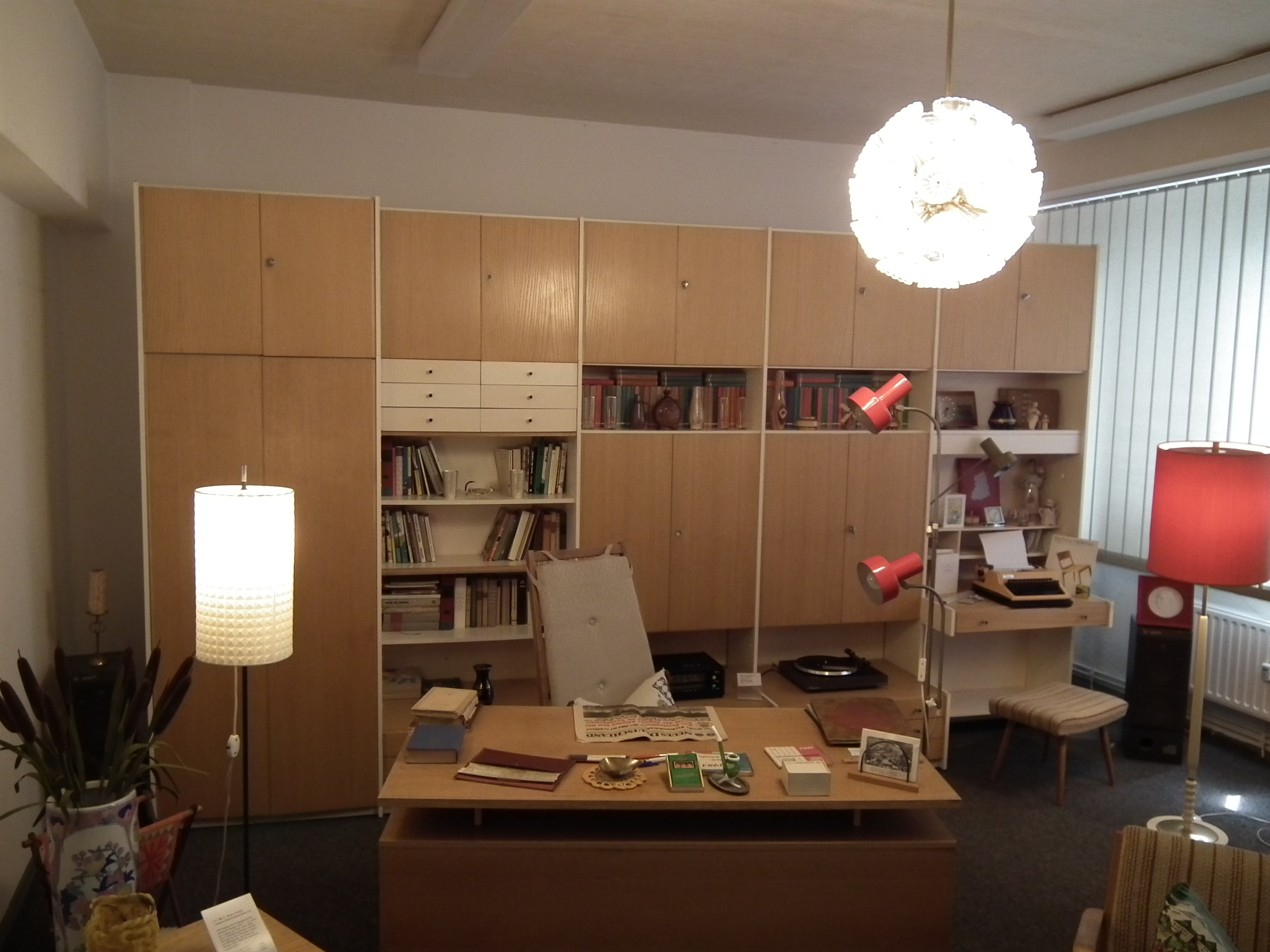 DDR-Museum Zeitreise in Radebeul, typisches Arbeitszimmer mit MDW Hellerauer Schrankwand